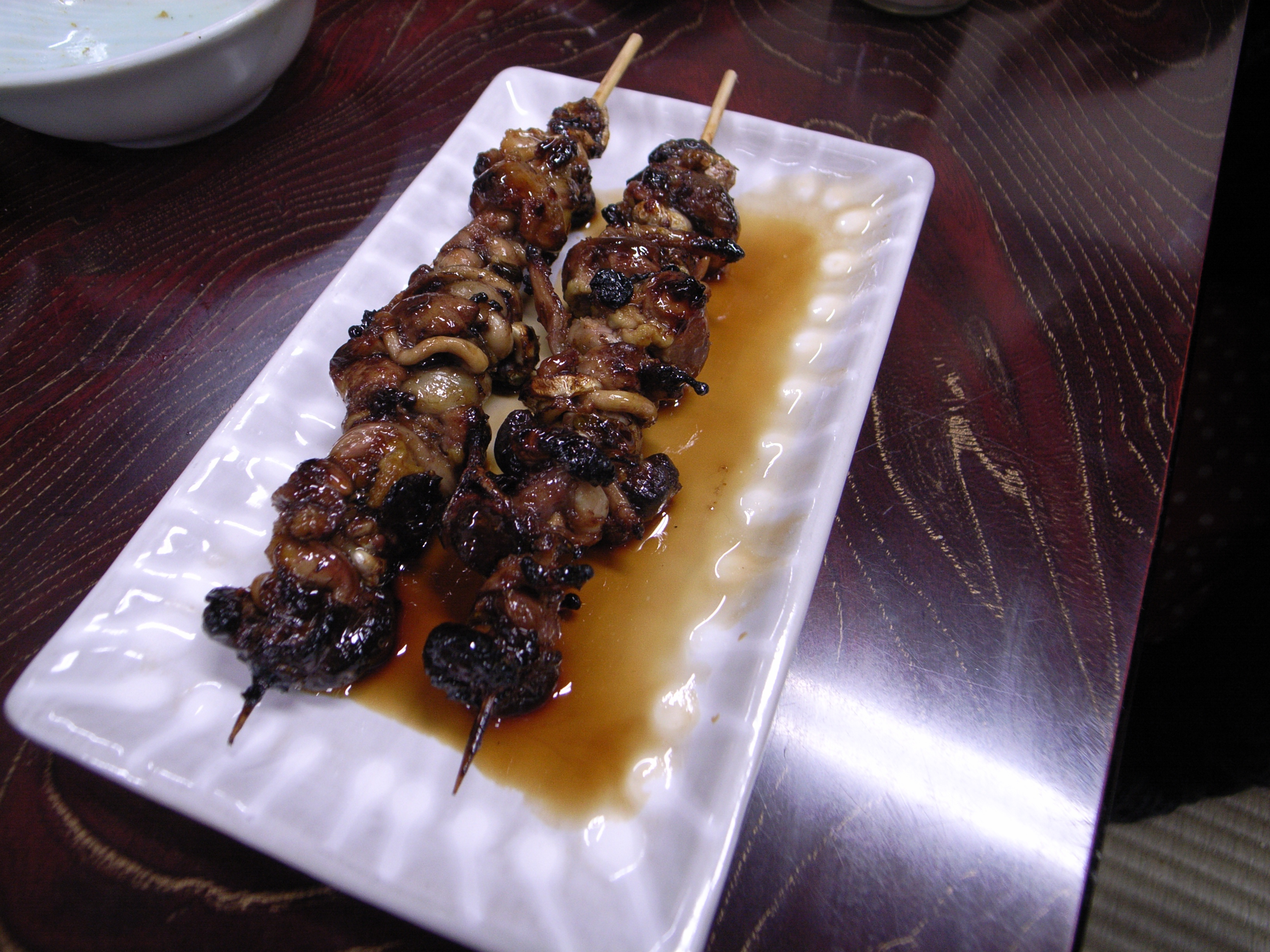 kimoyaki akabane marumasuyaFoodCourt